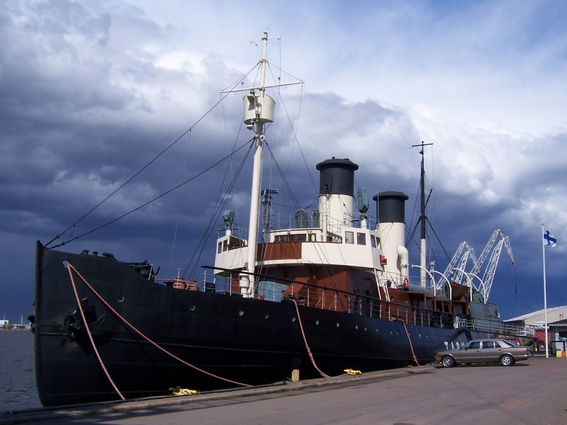 Eisbrecher Tarmo 14. Mai 2006